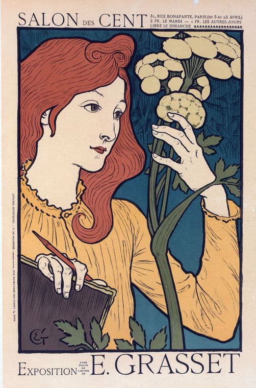 Affiche d'exposition art nouveau d'Eugène Grasset: Salon des Cent, 31 rue Bonaparte, Paris (du 5 au 25 avril) 5 Fr. le mardi - 1 Fr. les autres jours. Libre le dimanche. Exposition E. Grasset.